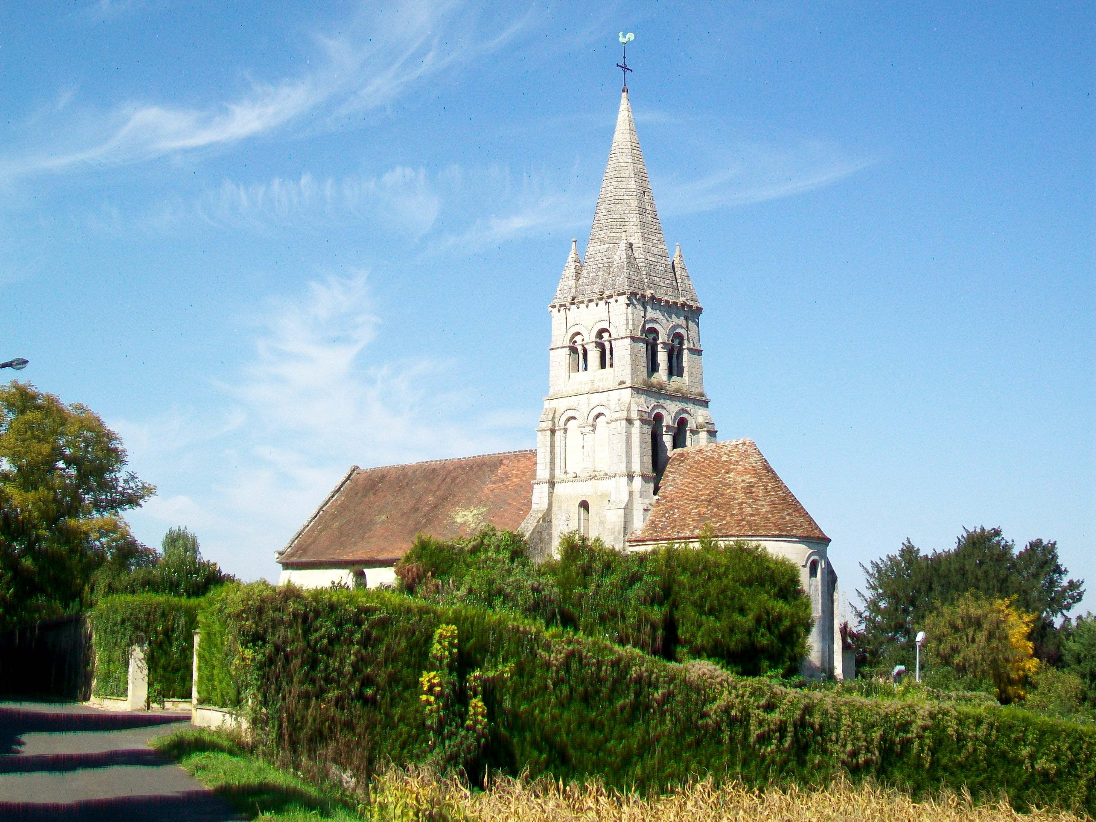 Vue sur l'église Saint-Vaast depuis le sud-est.